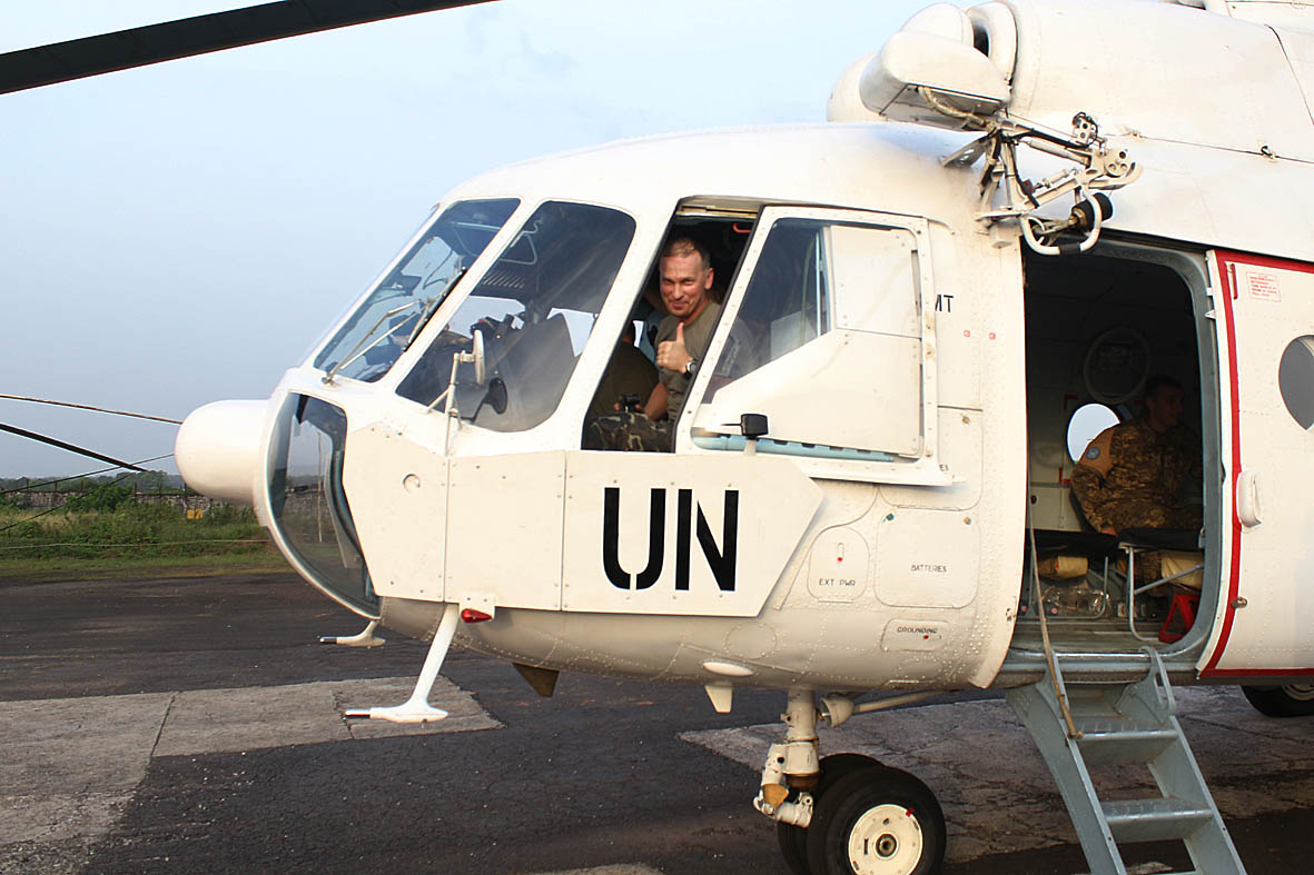 Протягом тижня українські вертолітники 56-го окремого вертолітного загону Місії ООН у Ліберії на вертольоті Мі-8 разом зі спостерігачами на борту виконували спостережні польоти та демонстрували присутність ООН над містами та населеними пунктами півдня країни. Керівництво Місії ООН направило український вертоліт та вісім миротворців у Кот-Д’Івуар для сприяння мирного та демократичного волевиявлення громадян під час виборів до парламенту країни. Очолював групу українських миротворців заступник командира 56-го овз, полковник Мухаммад Буланбаєв. За його словами, наші військовослужбовці в повній мірі впорались із завданням та благополучно повернулися в Ліберію на аеродром базування Робертсфілд. – Перед нами стояло два основних завдання, – розповідає полковник Буланбаєв, – це демонструвати присутність ООН та сприяти міжнародним спостерігачам здійснювати моніторинг ситуації під час виборів. Хочу сказати, що відрядження до Кот-Д’Івуару було досить вдалим і приємним. Особовий склад здобув певний досвід, загальний наліт склав майже 32 години. Крім того, нас дуже тепло зустріли, як старих друзів. Місцеві позитивно, із вдячністю згадують наш вертолітний підрозділ, який вивели з країни менше року тому. Керівництво Місії високо оцінило роботу наших вертолітників та подякувало за успішне виконання завдань. Помічник командира по зв’язкам зі ЗМІ майор Олександр Олехнович, Ліберія